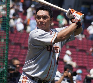 Giants_abe_10